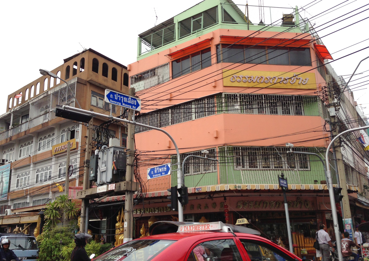 Sao Chigcha, phra Nakhon, bangkok 10200, thailand